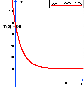 Differentialligningens løsning er tegnet med rød. Den vandrette asymptote er tegnet med grøn.